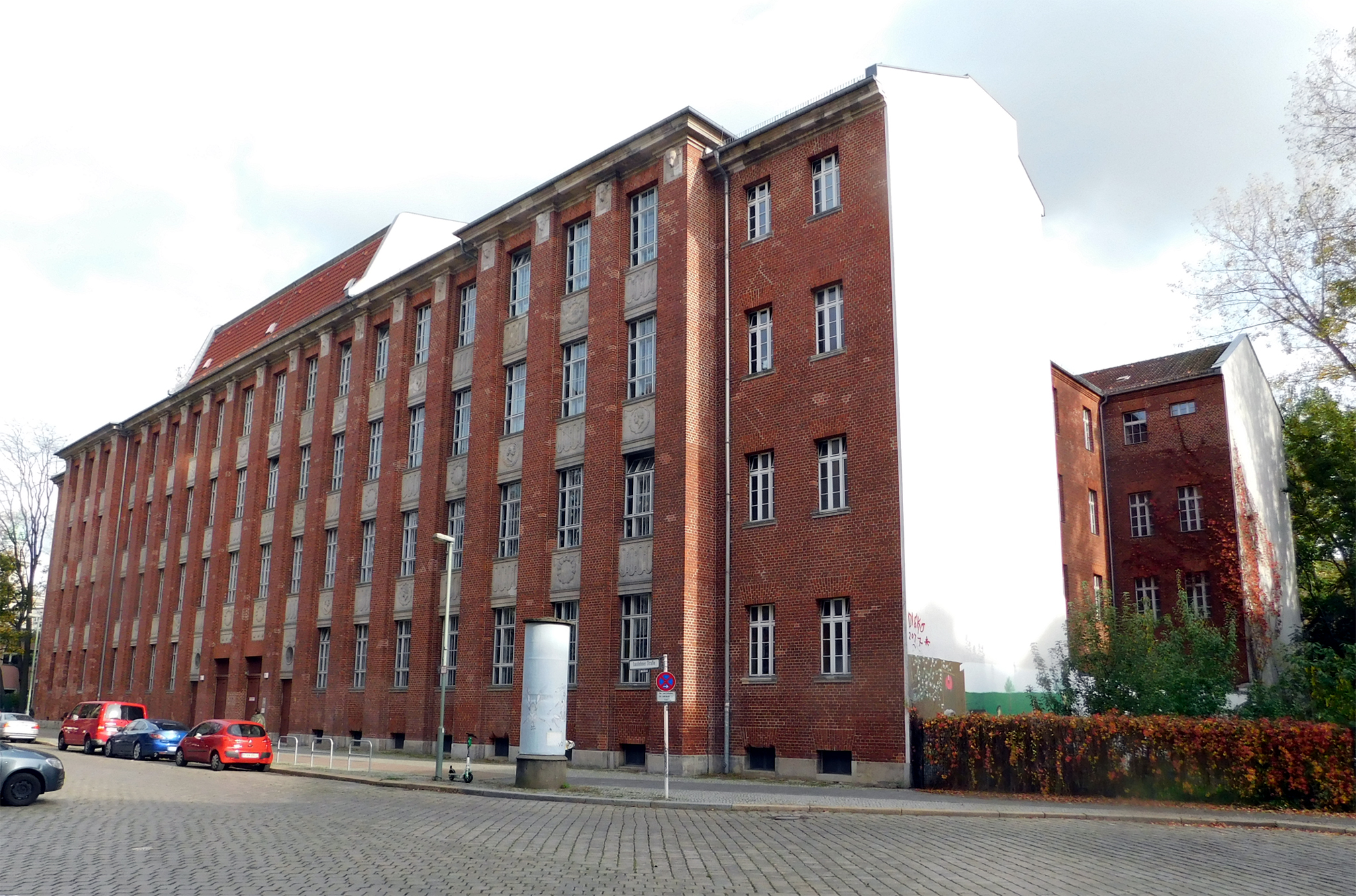 Das denkmalgeschützte Schulgebäude in der Lasdehner Straße (Architekt: Ludwig Hoffmann (1852-1932), errichtet 1906-1908) beherbergt seit 1995 die Ludwig-Hoffmann-Grundschule.